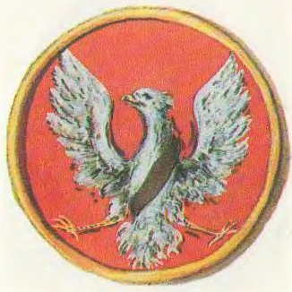 Беларуская (тарашкевіца): Віжайны (Vižajny). Герб места